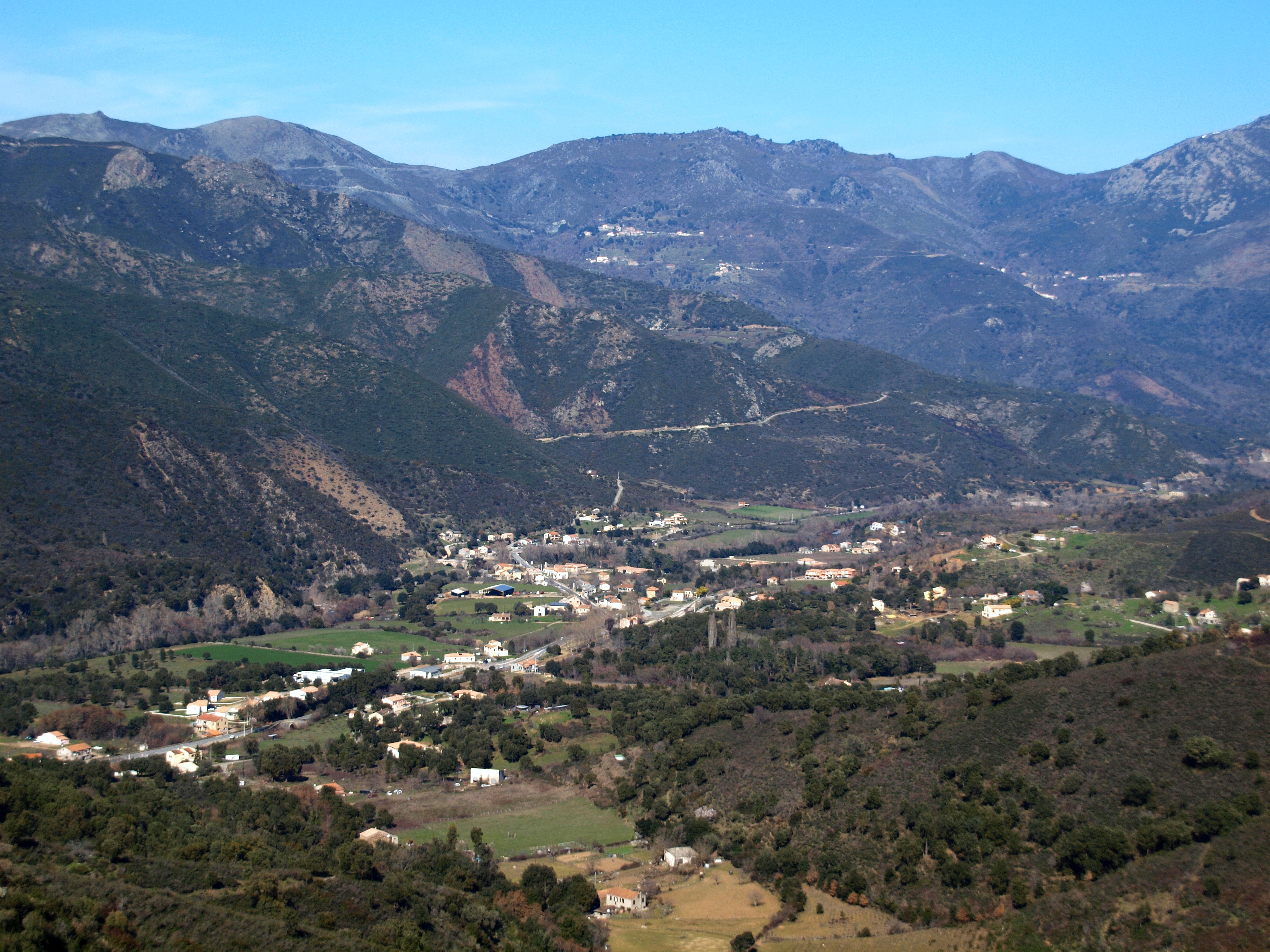 Castello-di-Rostino, Rustinu (Corse) - Vue de l'agglomération de Ponte-Novu dans la vallée du Golo